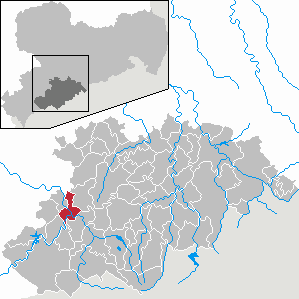 Aue im Erzgebirgskreis, Sachsen